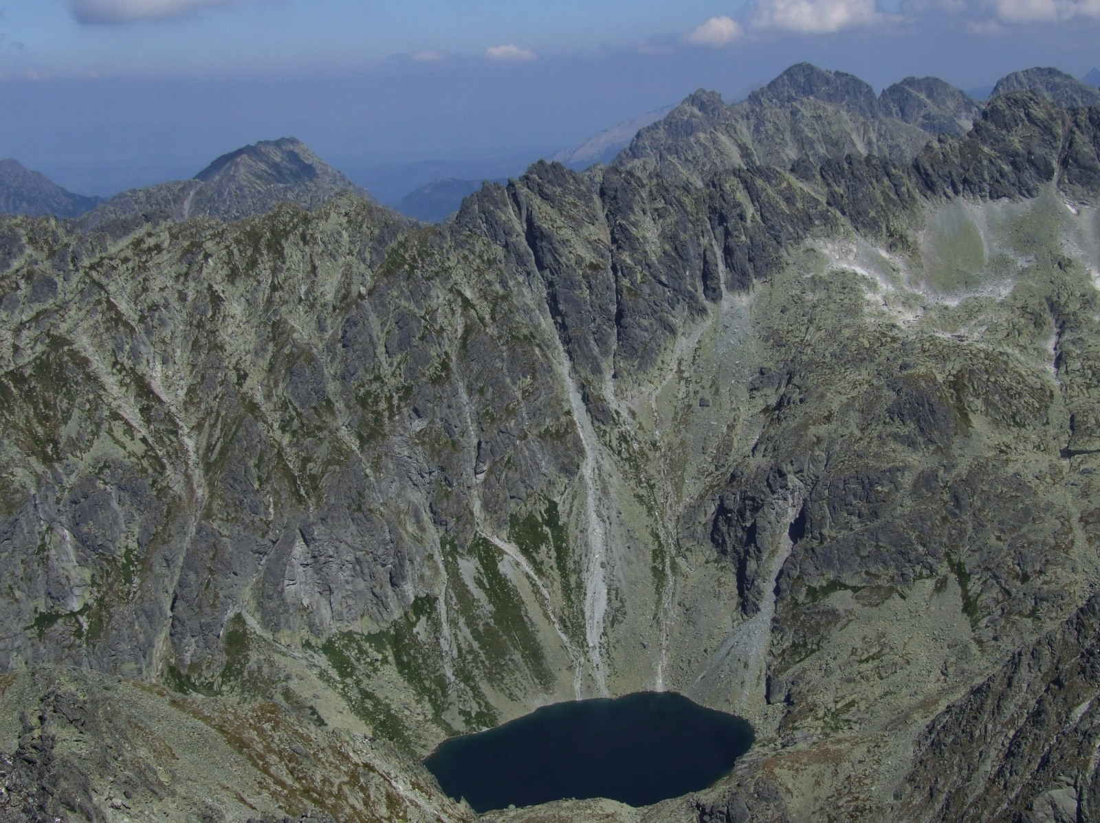 Niżni Teriański Staw (Nižné Terianske pleso). Widok z Krywania